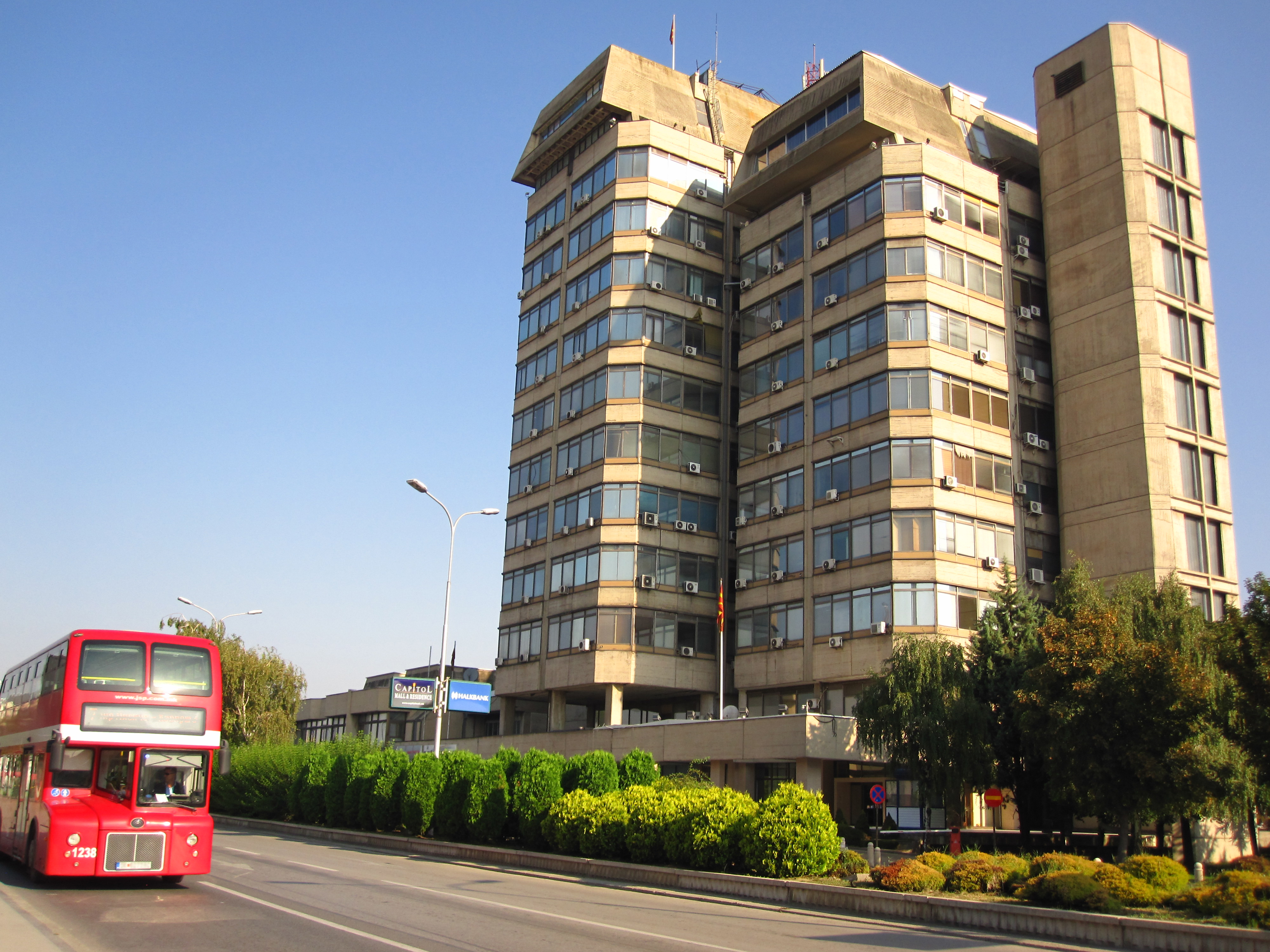 Народна Банка на РМ - Скопје.